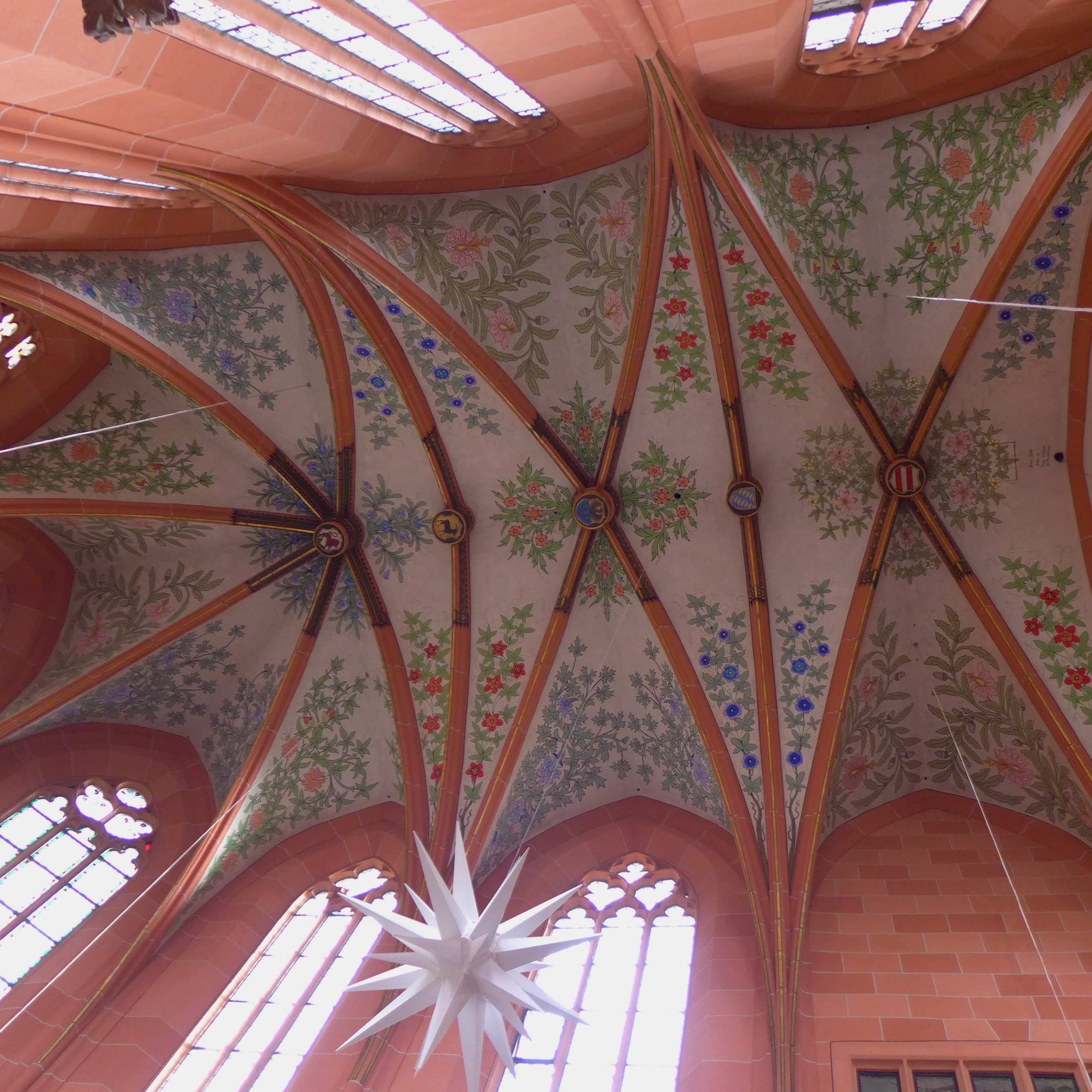 Stiftskirche St. Marien, Wertheim, Apsisgewölbe mit Rankenmalereien von Tiran Gikorjan aus dem Jahr 2006